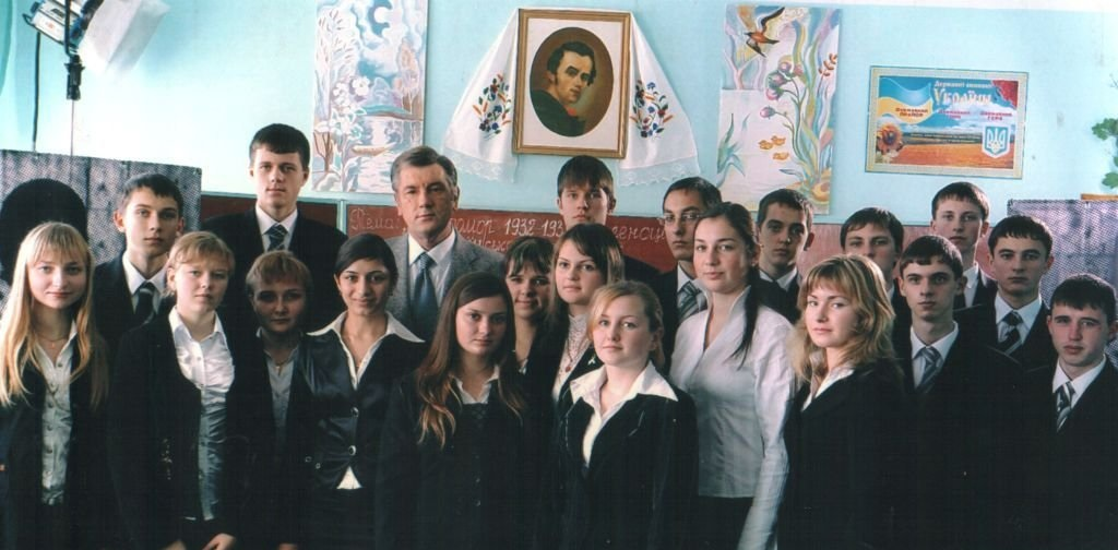 Ющенко